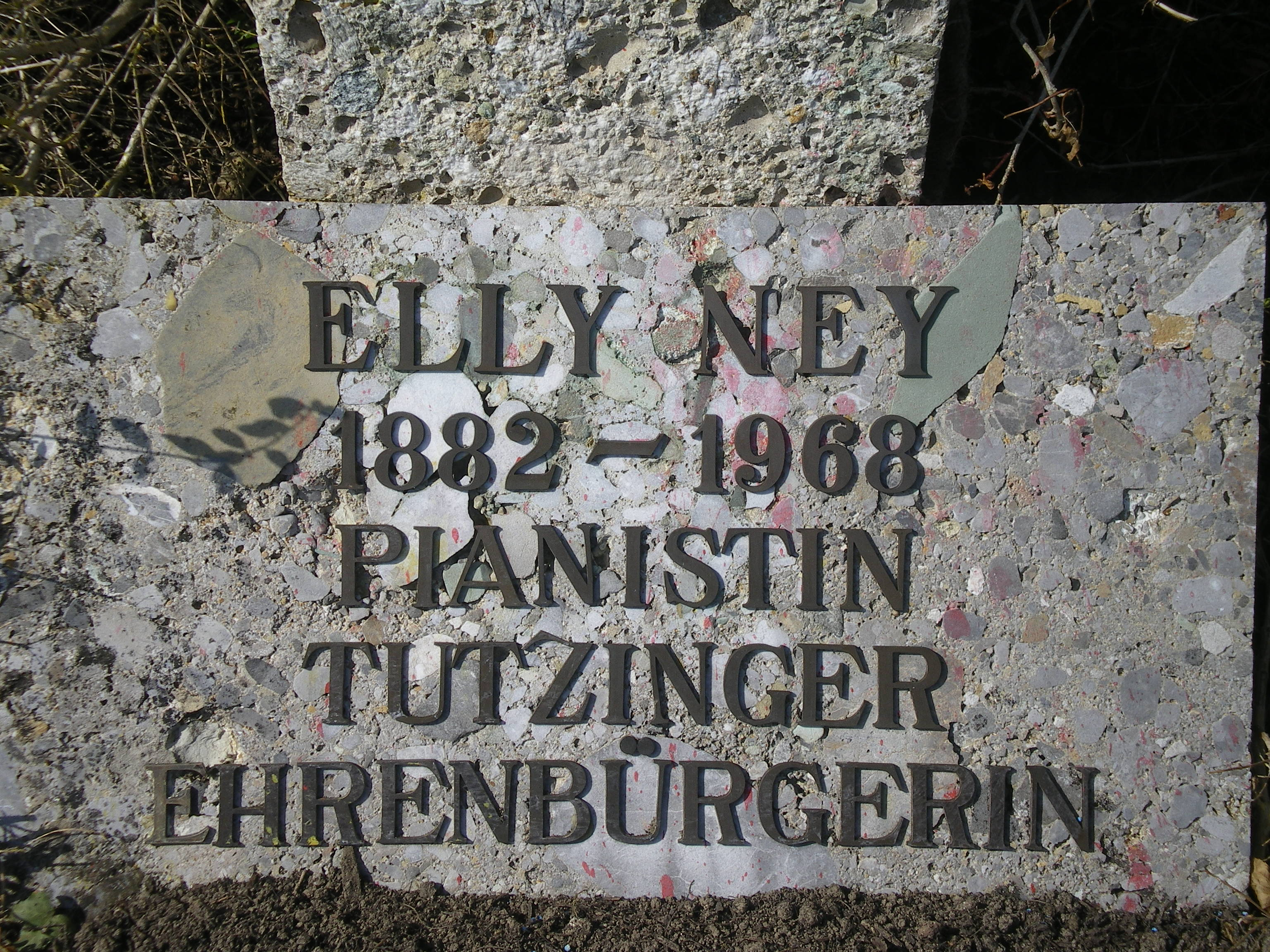 Elly Ney denkmal an der Brahms-Promenade in Tutzung;Detail Beschriftung